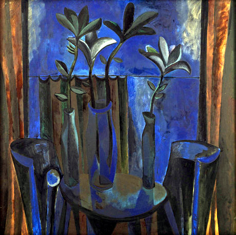 «Կապույտ նատյուրմորտ», 1971, Շահմուրադյան Վարոս